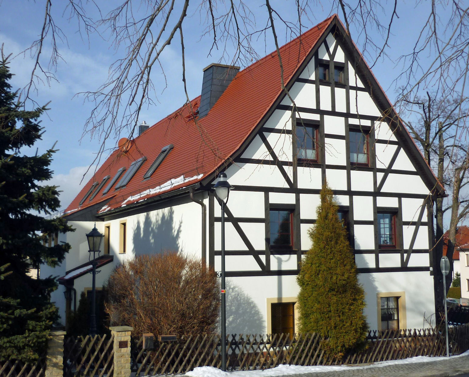 Altdölzschen 37 in Dresden-Dölzschen